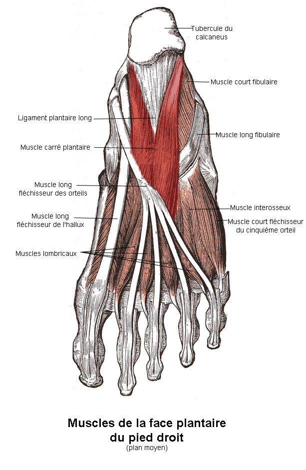 Muscle carré plantaire. Anatomie humaine